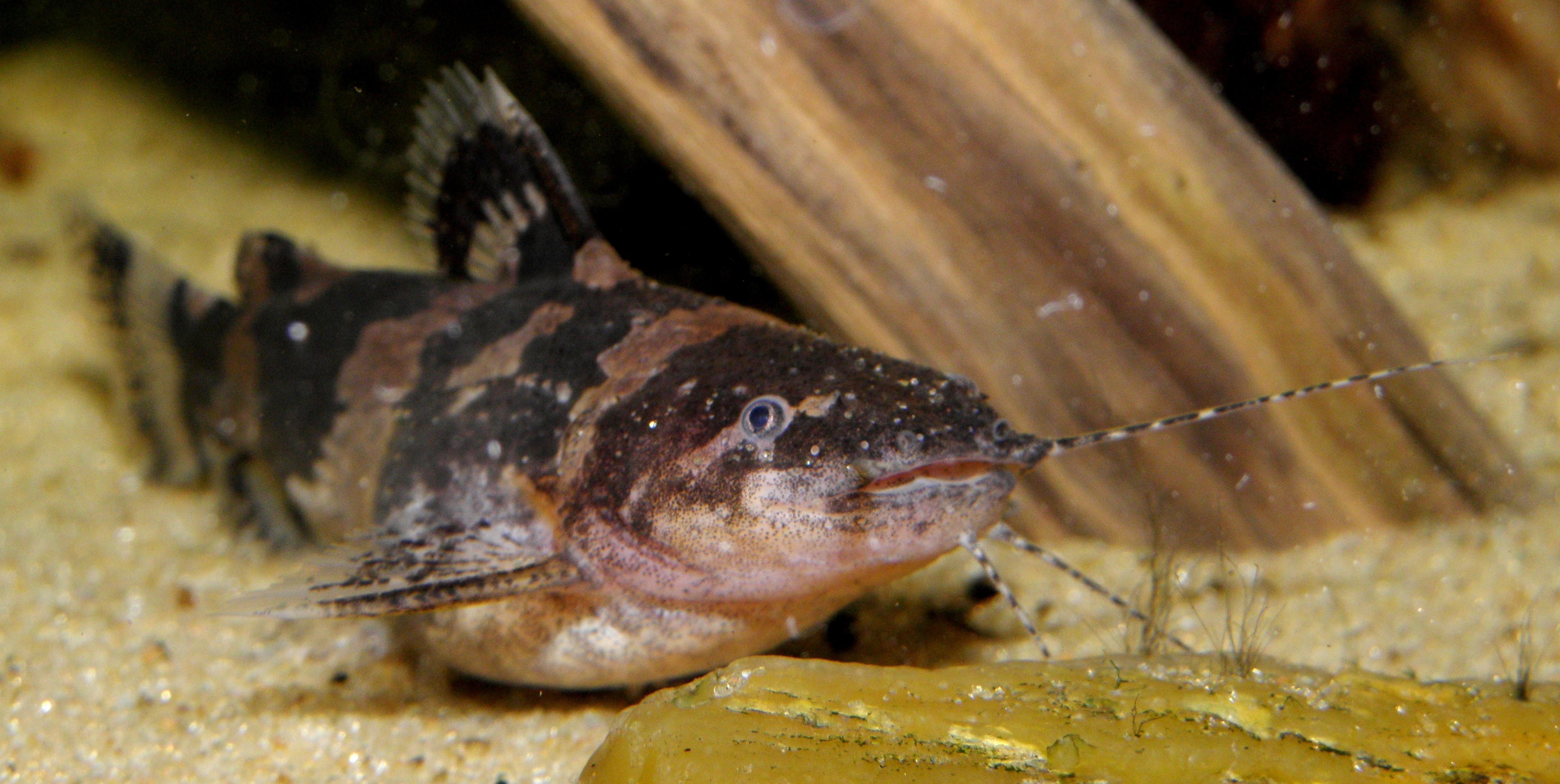 Un ejemplar perteneciente al género Microglanis, integrado por pequeños peces silúridos de agua dulce de la familia Pseudopimelodidae.